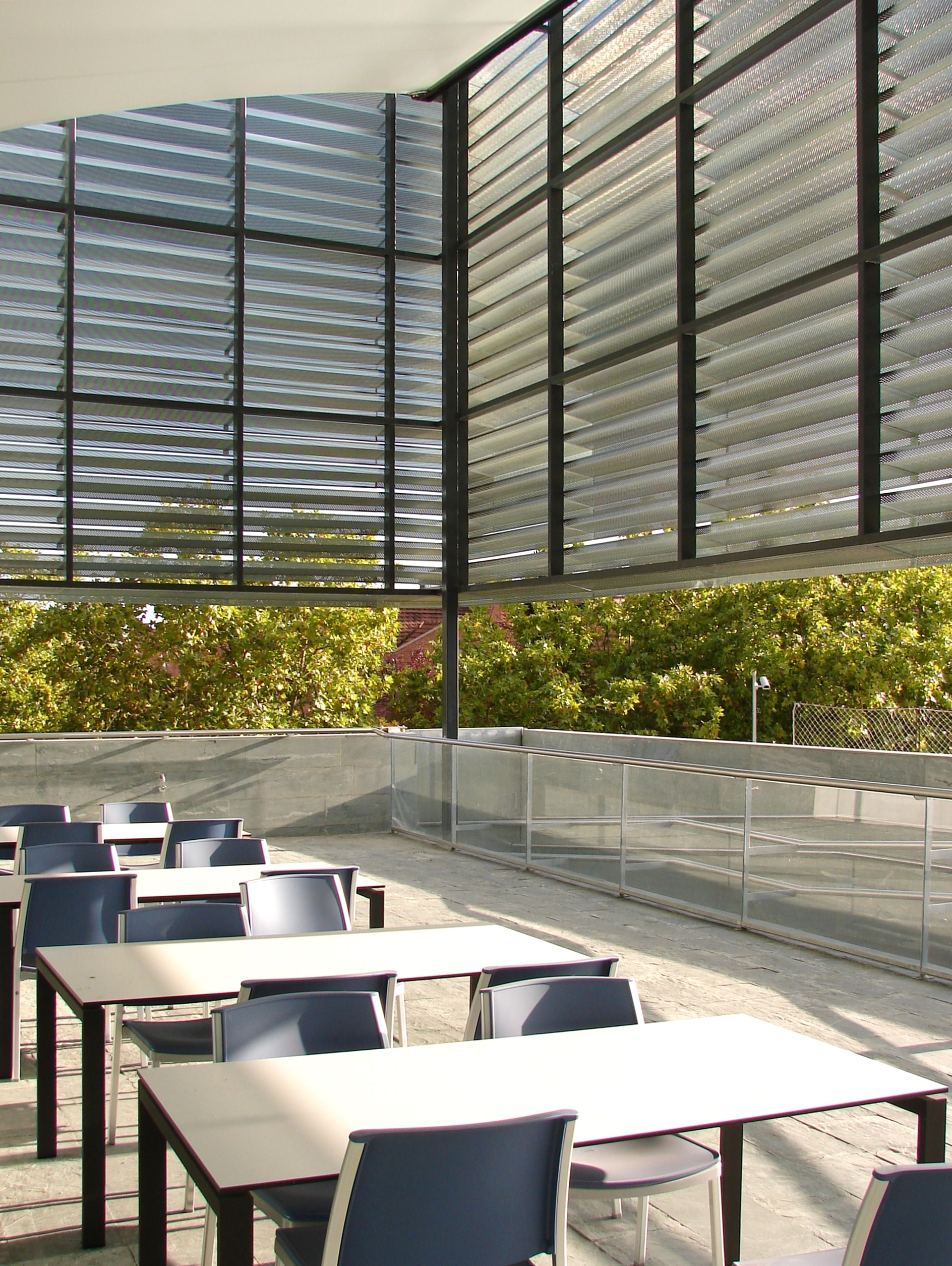 Biblioteca Municipal - Public Library - Lope de Vega (Tres Cantos) -Madrid